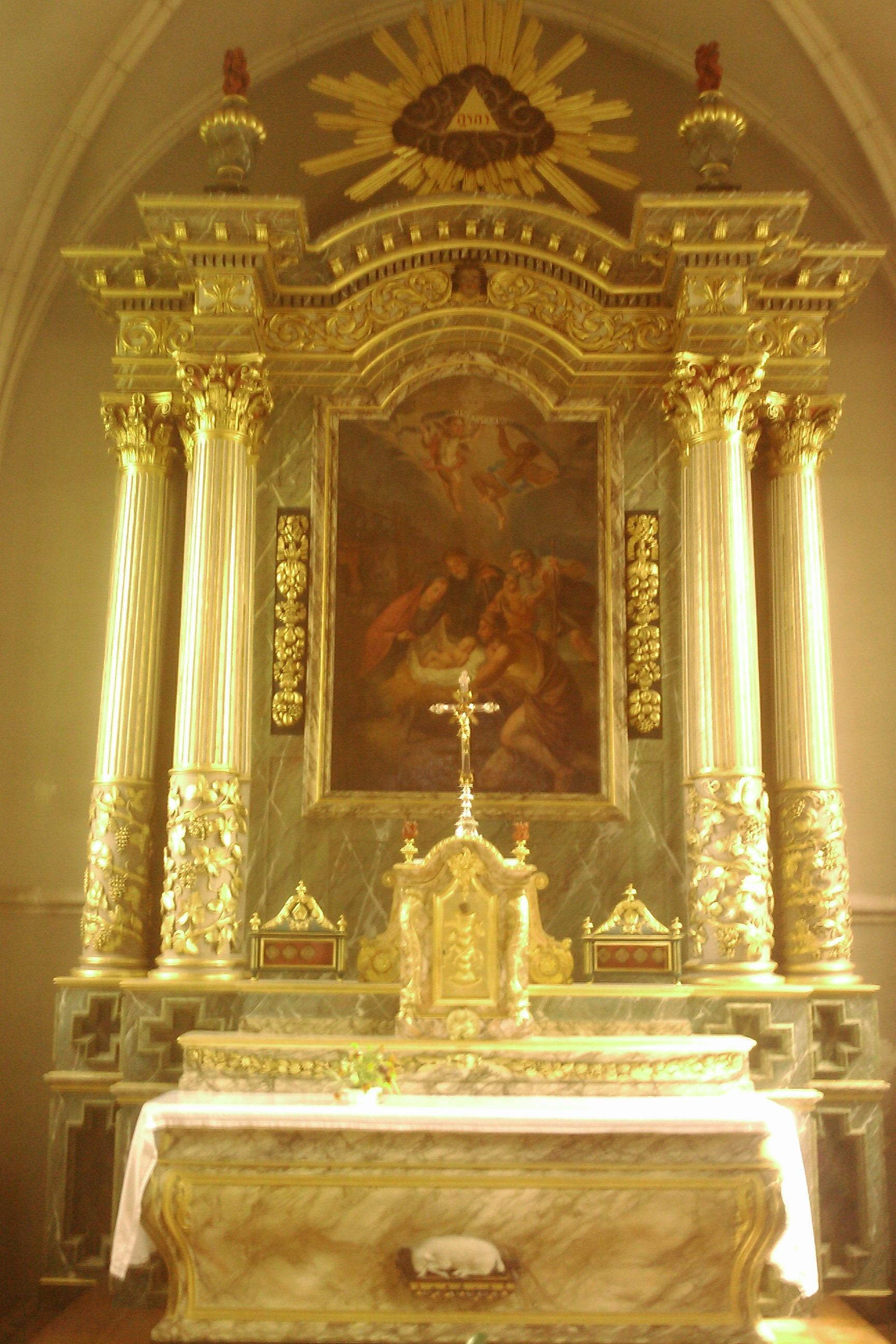 Maitre autel classé de l'Église Saint-Germain de Moyon